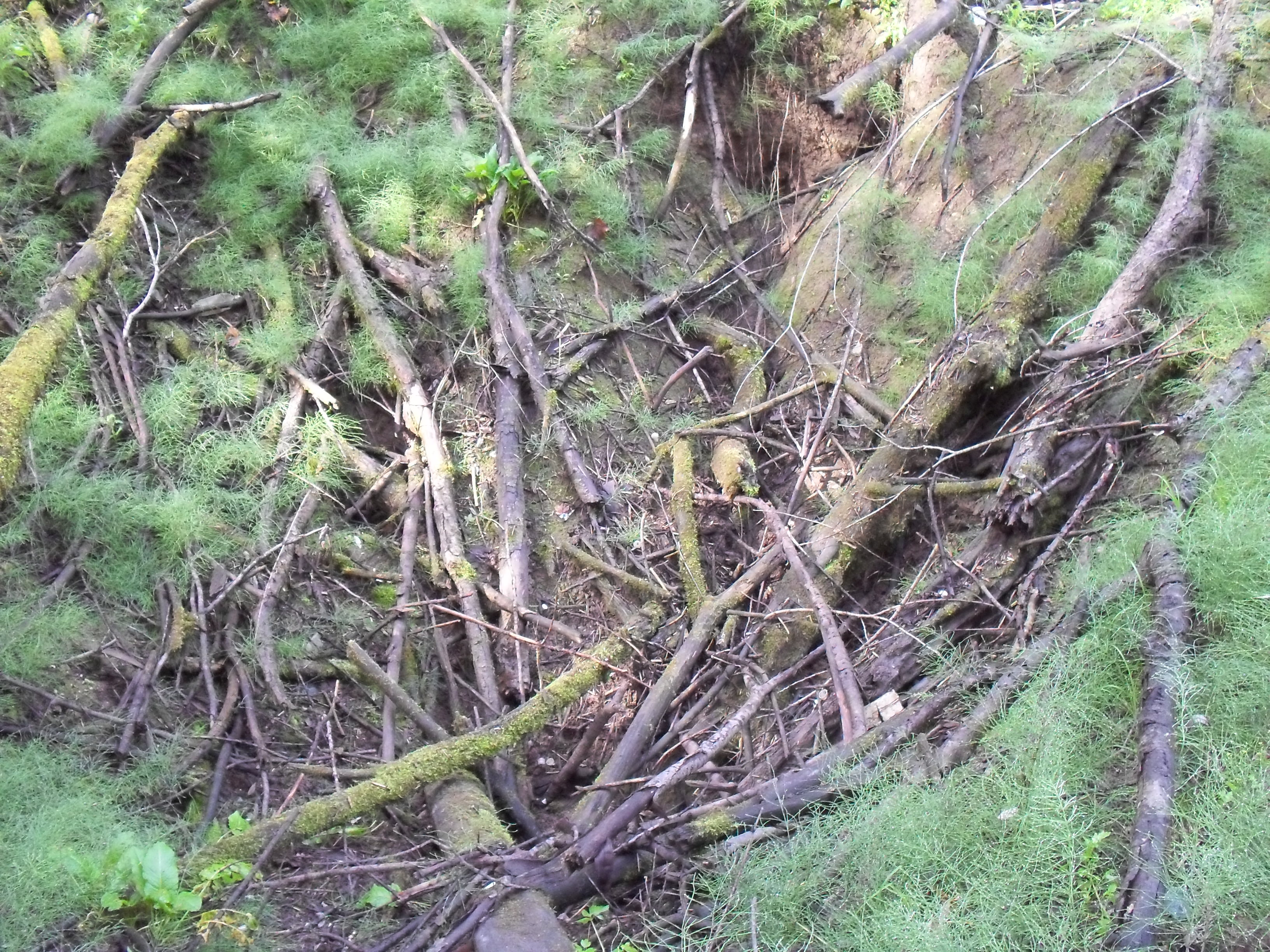 Абхазия. Воронка-понор у оз.Рица